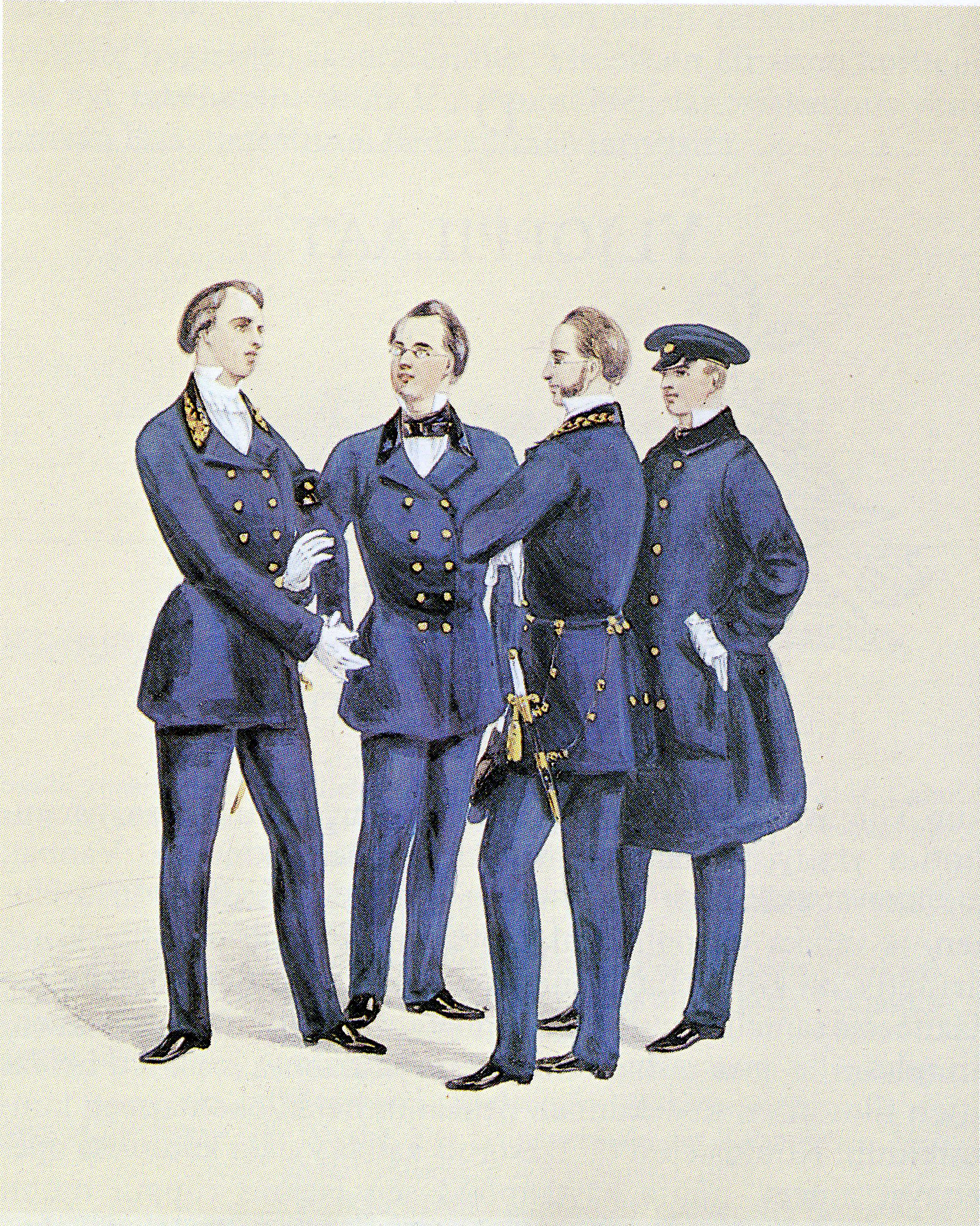 Severin Falkmanin guassi, jonka tarkoituksena oli esitellä Suomen ylioppilaille suunniteltuja uusia univormuja. Kuvassa vasemmalta ylioppilaat Carl Robert Mannerheim, C. A. Weurlander, W. Margunoff ja Johan Jakob Chydenius.